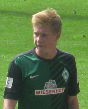 Kevin De Bruyne als Spieler von Werder Bremen in der Saison 2012/13.